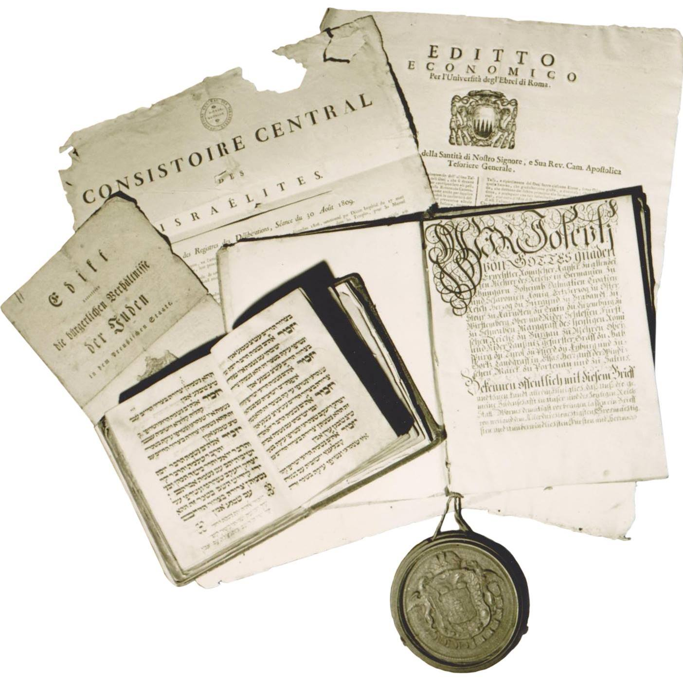 סמל הארכיון המרכזי לתולדות העם היהודי